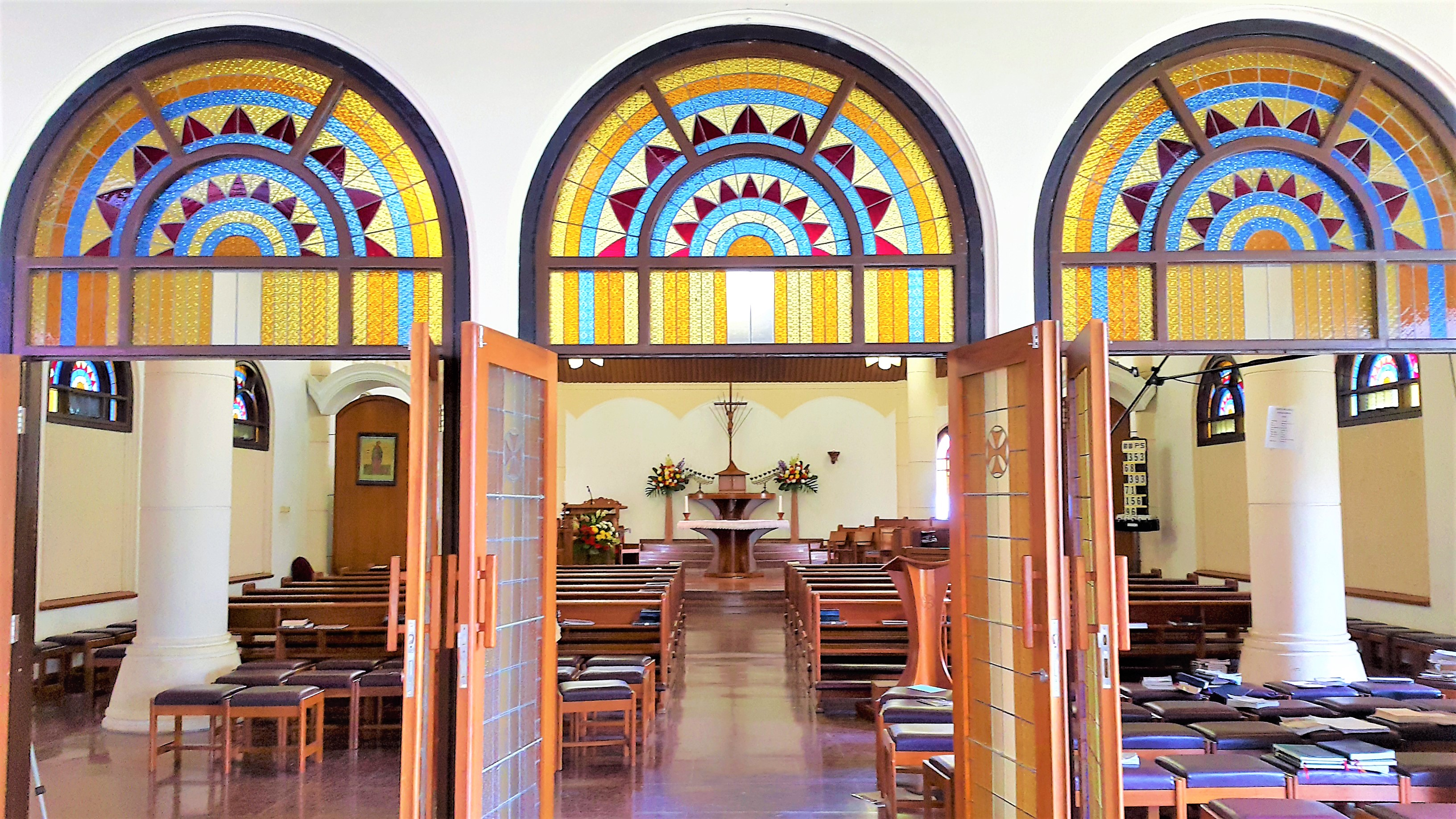 Kapel Santa Helena, Kompleks OSC